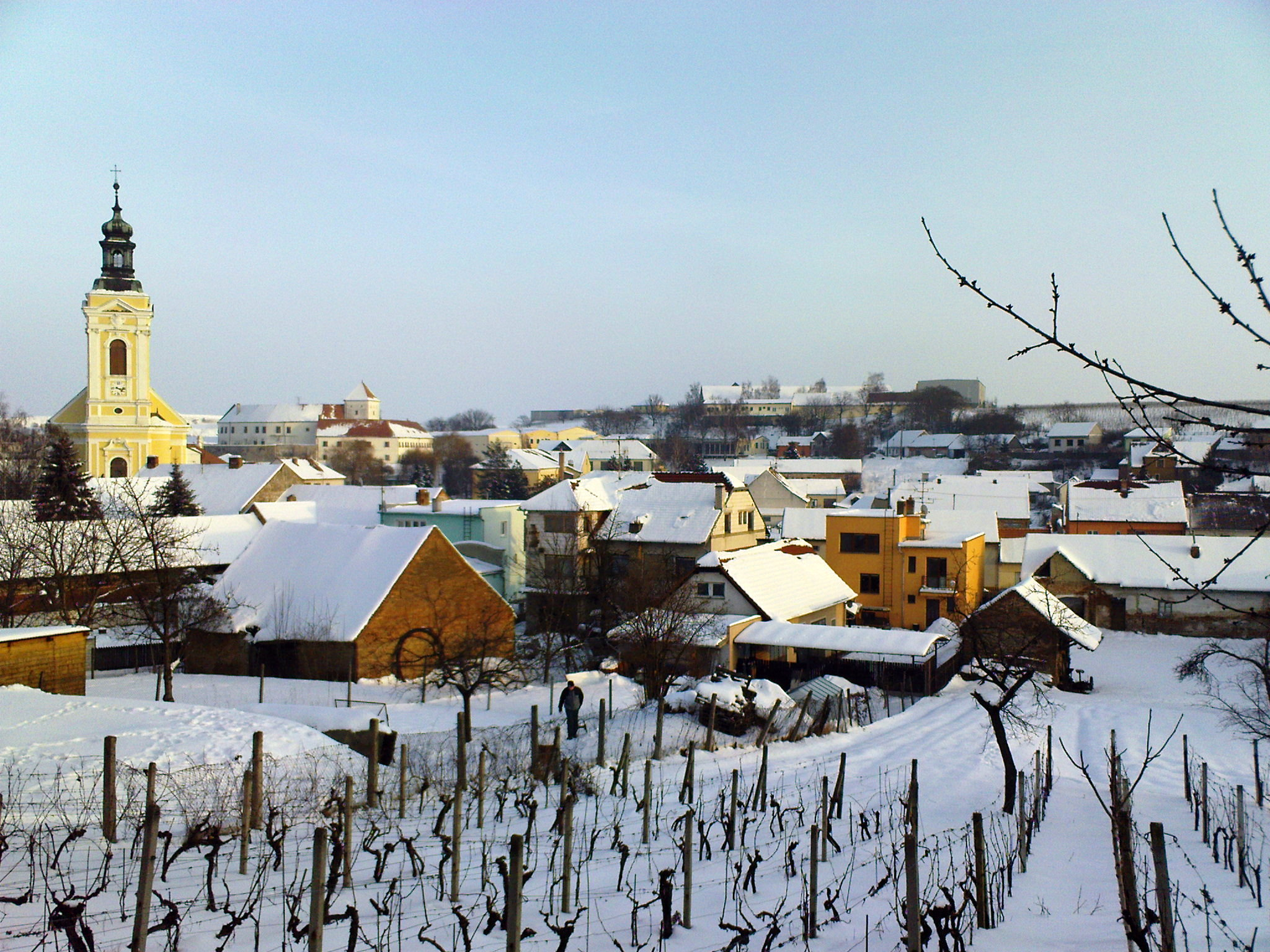 Čejkovice